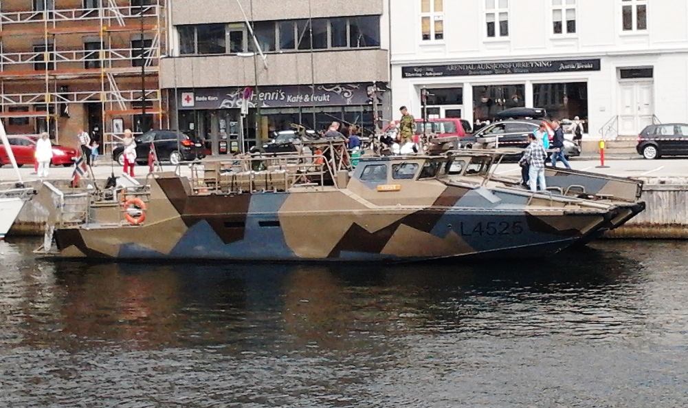 2 stk Stridsbåt 90N i Arendal, Norge